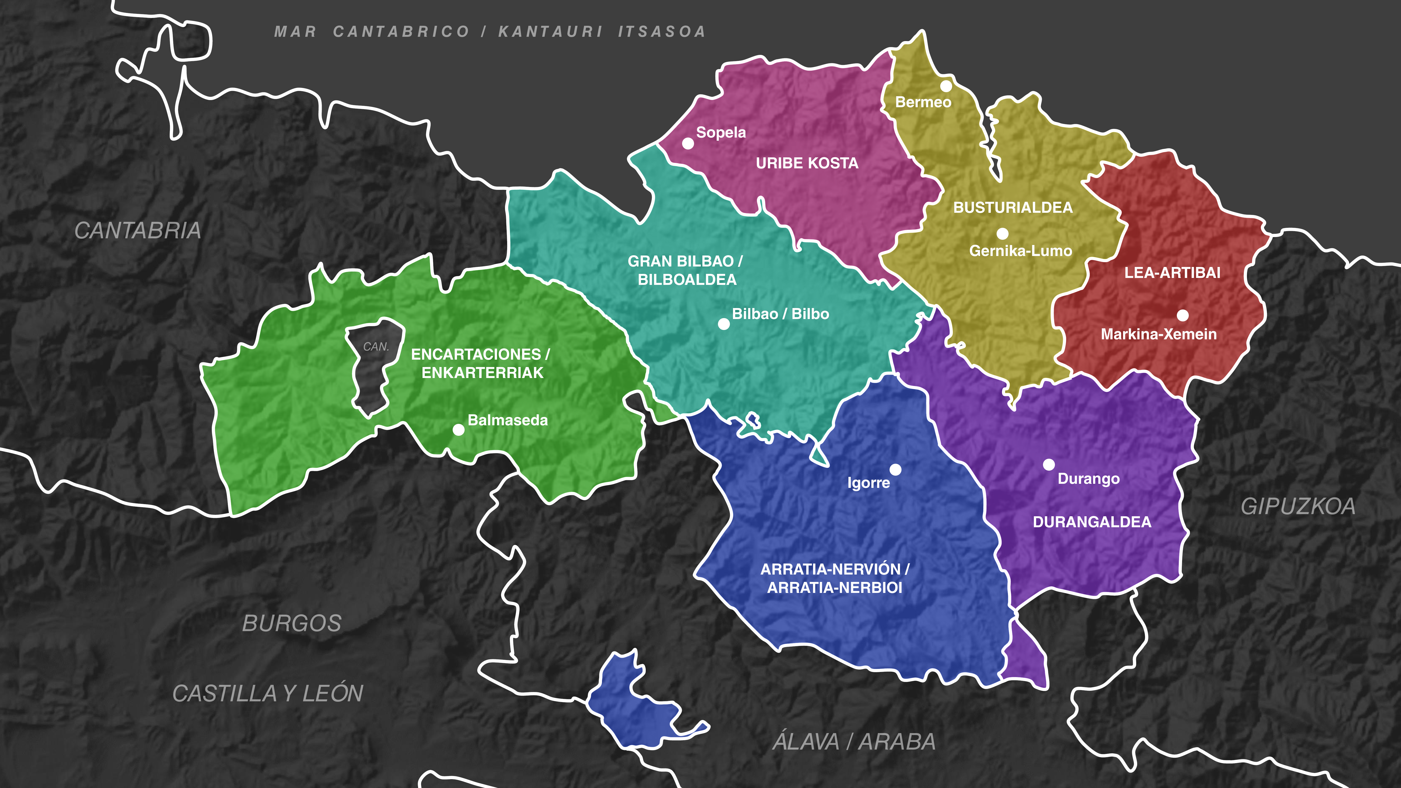 Mapa de las comarcas de Bizkaia y sus capitales correspondientes